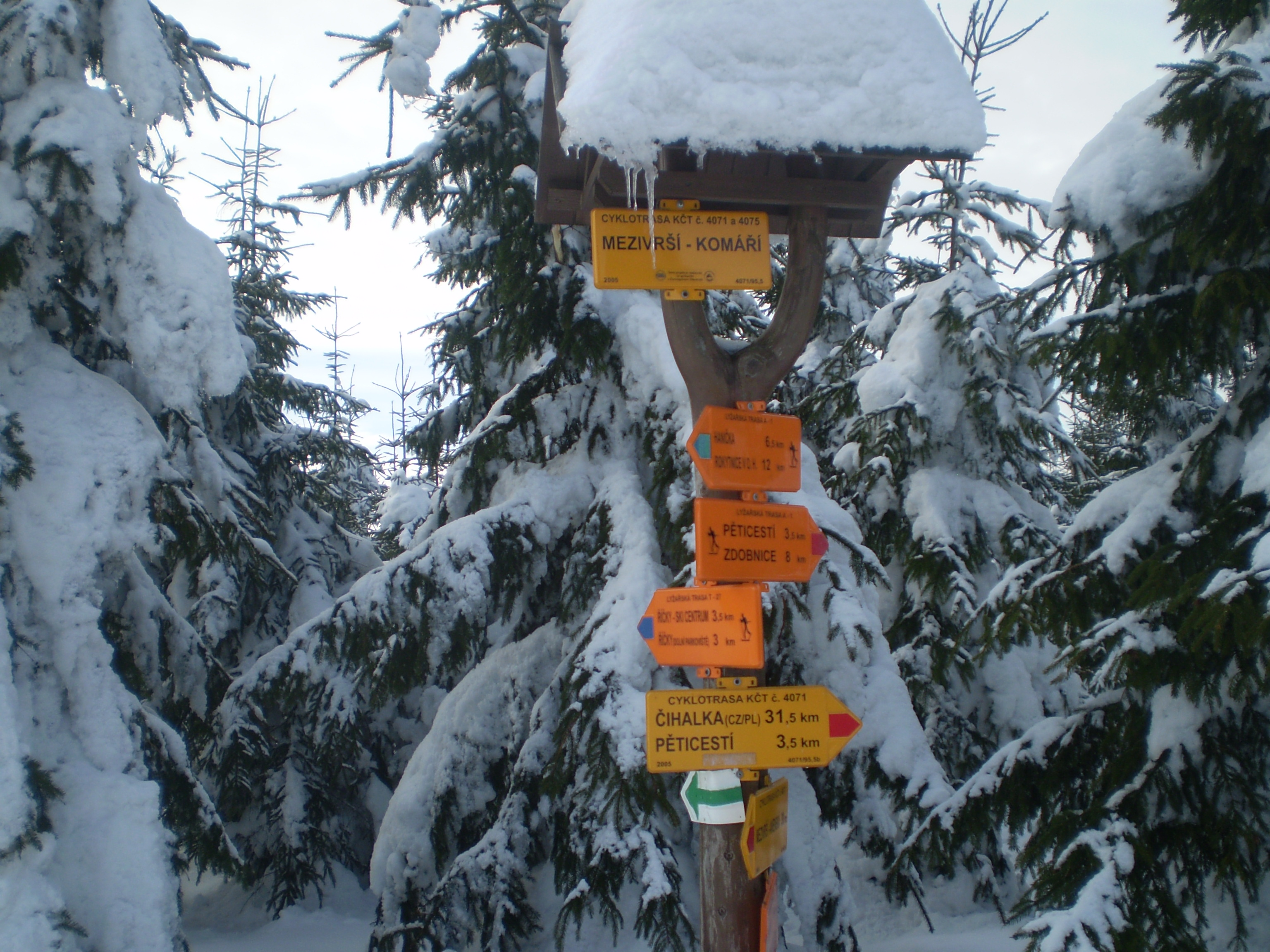 Mezivrší, Orlické hory